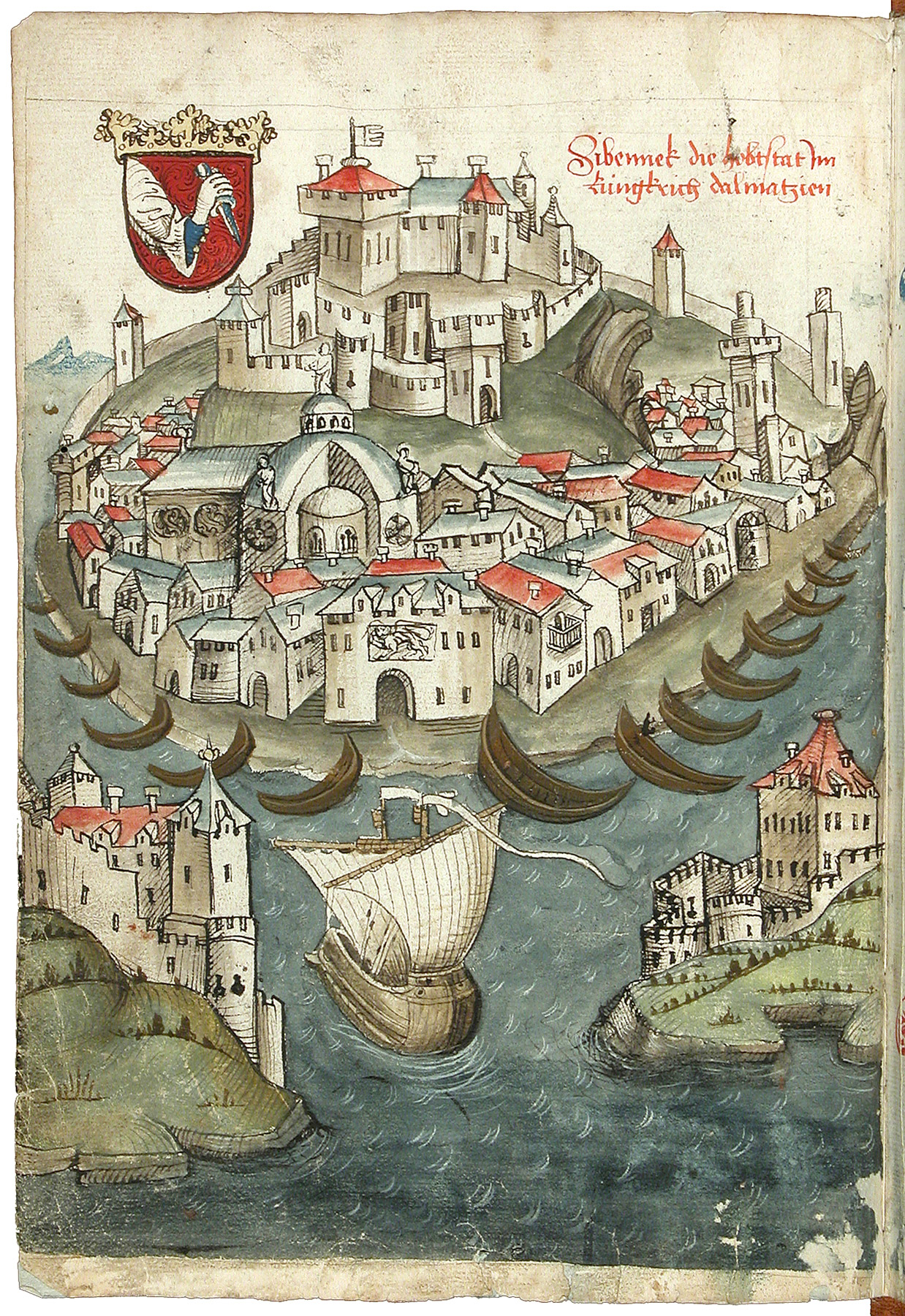 Schilderung einer Pilgerreise von Konstanz nach Jerusalem durch Konrad von Grünenberg, um 1487 Konrad von Grünenberg: Beschreibung der Reise von Konstanz nach Jerusalem - Cod. St. Peter, pap. 32. Handschrift, Bodenseegebiet (Konstanz?), um 1487. II + 53 Blätter, 32x21, mit 31 kolorierten Zeichnungen der Reiseroute von Venedig bis Palästina. Text in alemannischer Mundart.